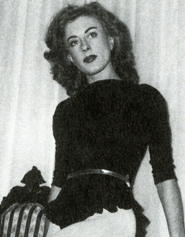 photo from Settimanale d'epoca (1955)